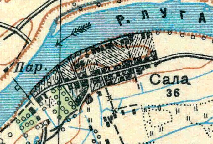 Топографическая карта Ленинградской области, квадрат О-35-21-Г-б (Калмотка), деревня Сала.